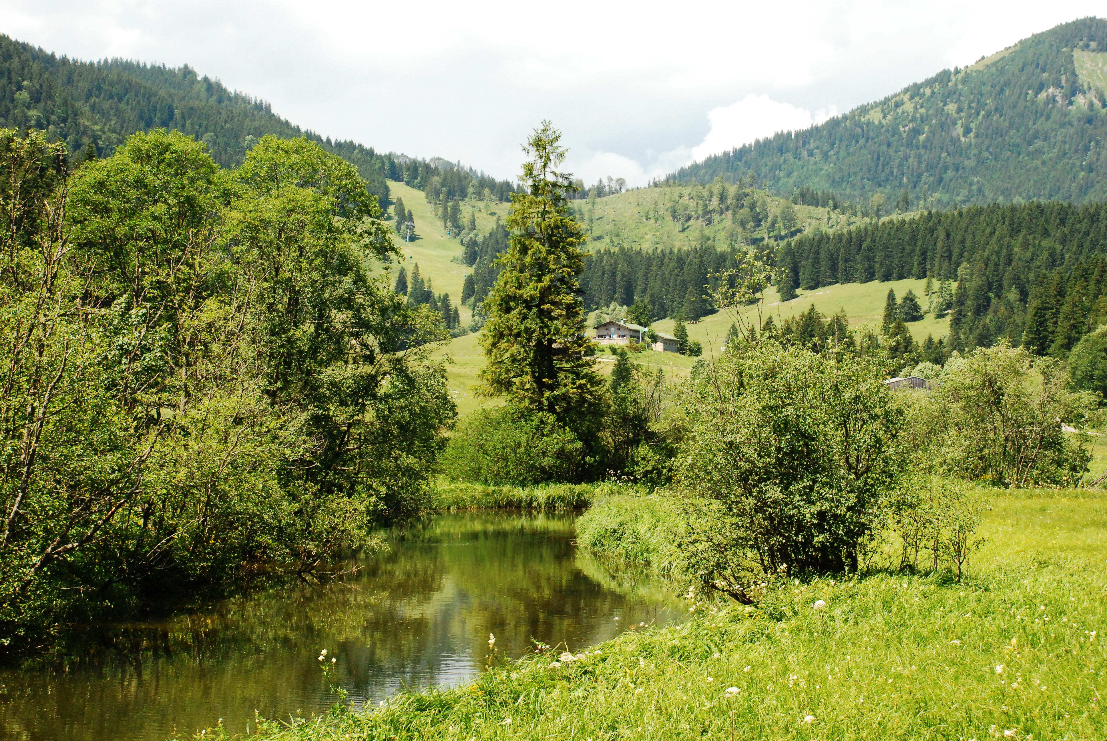 Rote Valepp unterhalb des Spitzingsee in Schliersee, Landkreis Miesbach, Regierungsbezirk Oberbayern, Bayern. Im Hintergrund die Albert-Link-Hütte des Deutschen Alpenvereins.